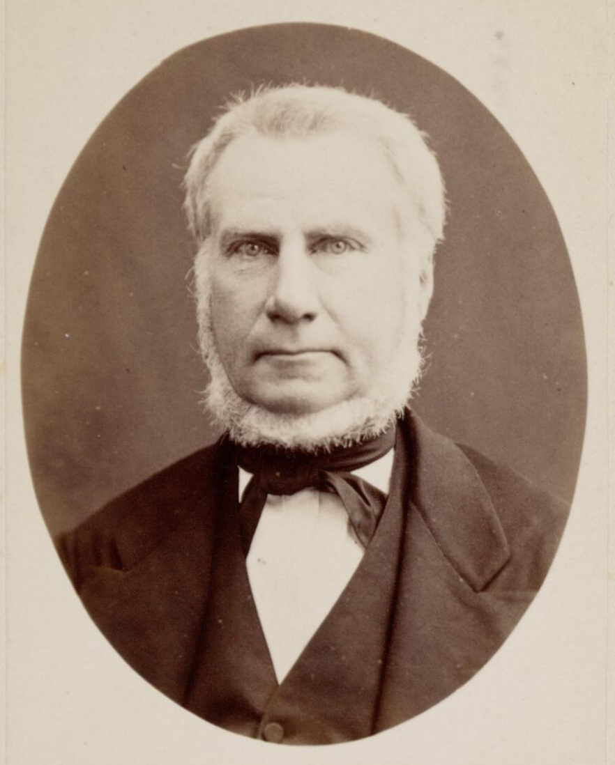 Portret van Gerhard Hendrik Uhlenbeck (1815-1888), carte-de-visite, 10,5 x 6,5 cm